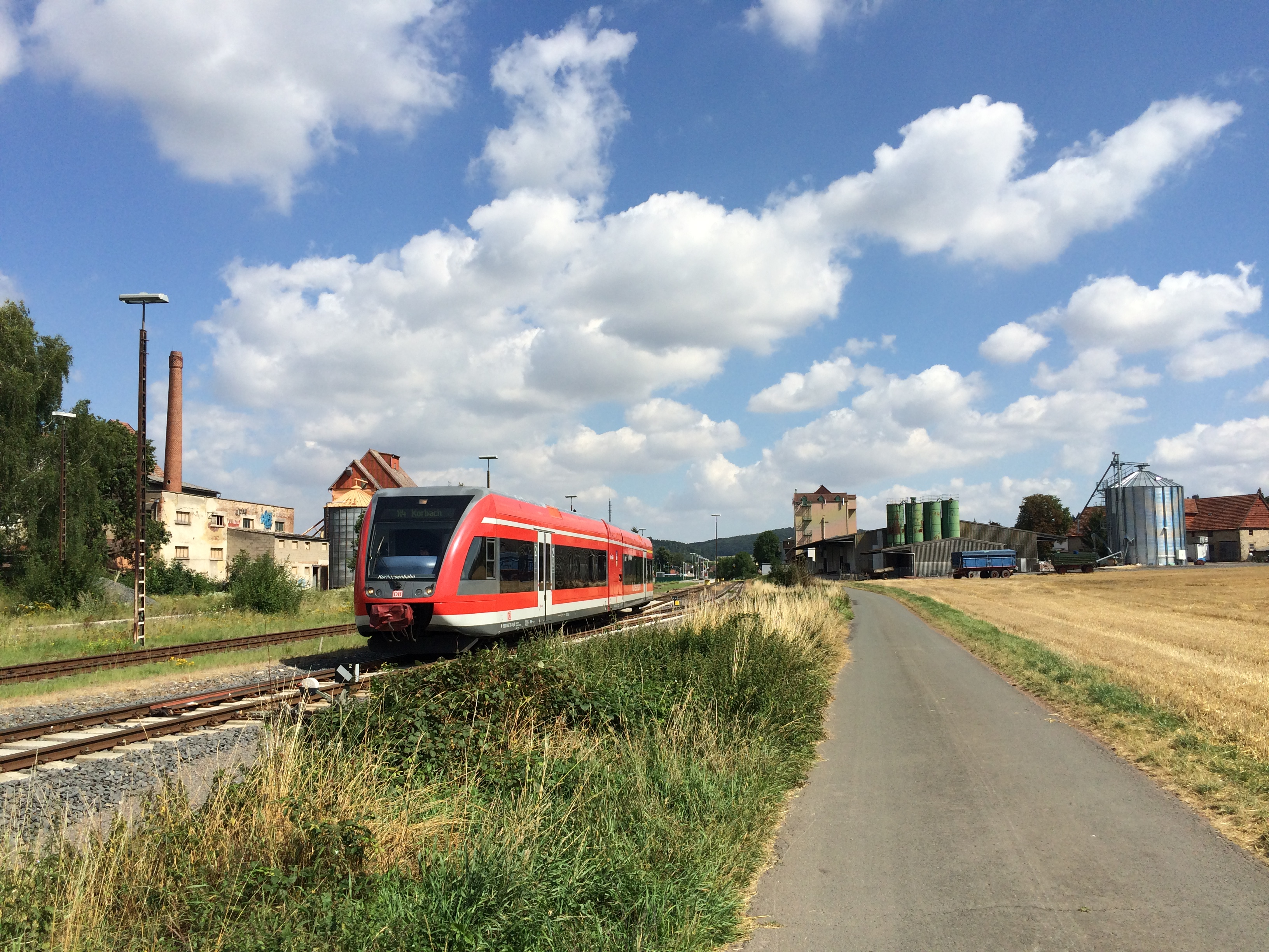 Twisteweg (Twiste-Radweg) zwischen Twistesee (Kreisstraße 6) und Volkmarsen südöstlich vom Bahnhof Volkmarsen. Im Bild Dieseltriebwagen (DB-Baureihe 646 / Stadler GTW) der Kurhessenbahn Richtung Korbach.